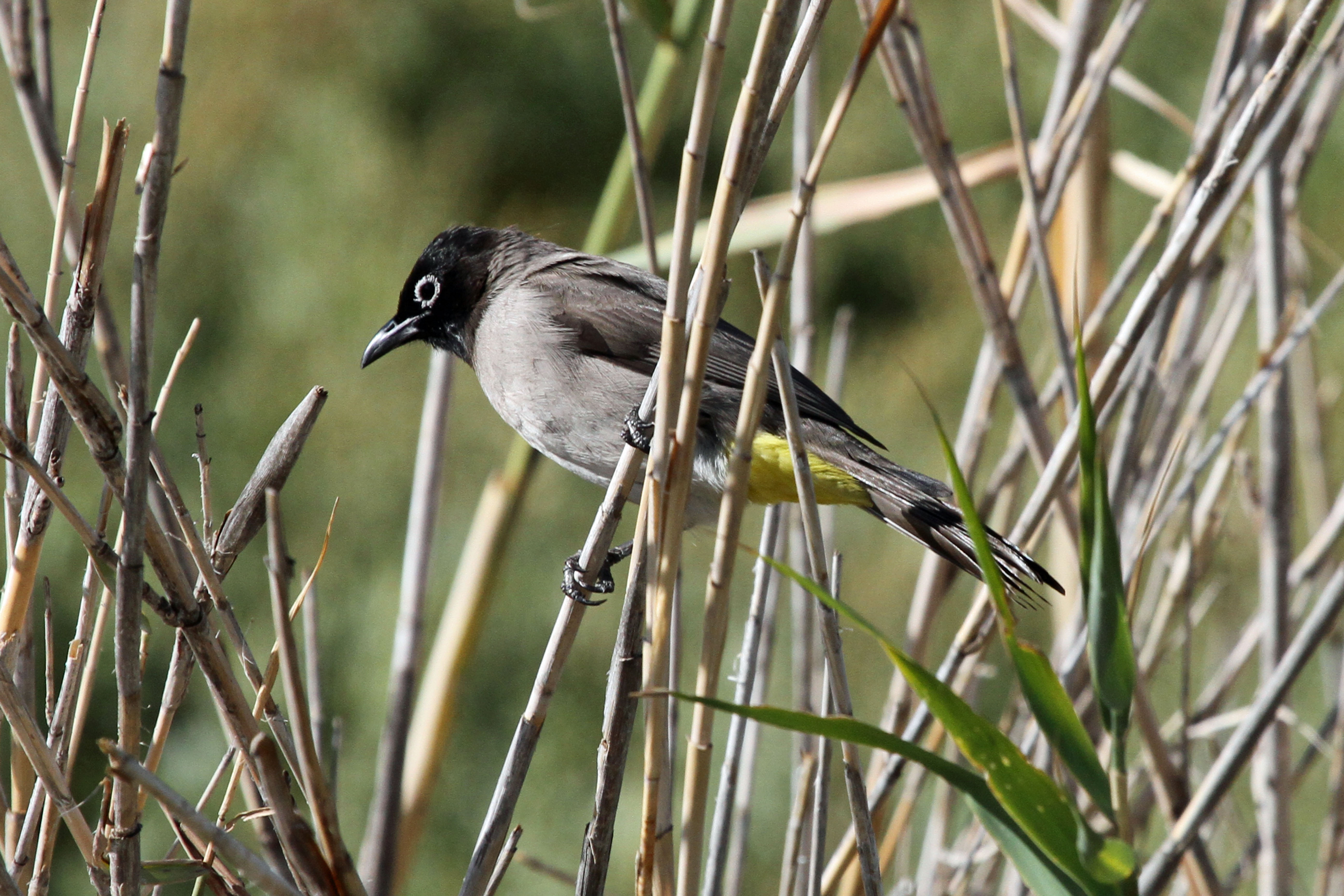 White-spectacled Bulbul Israel